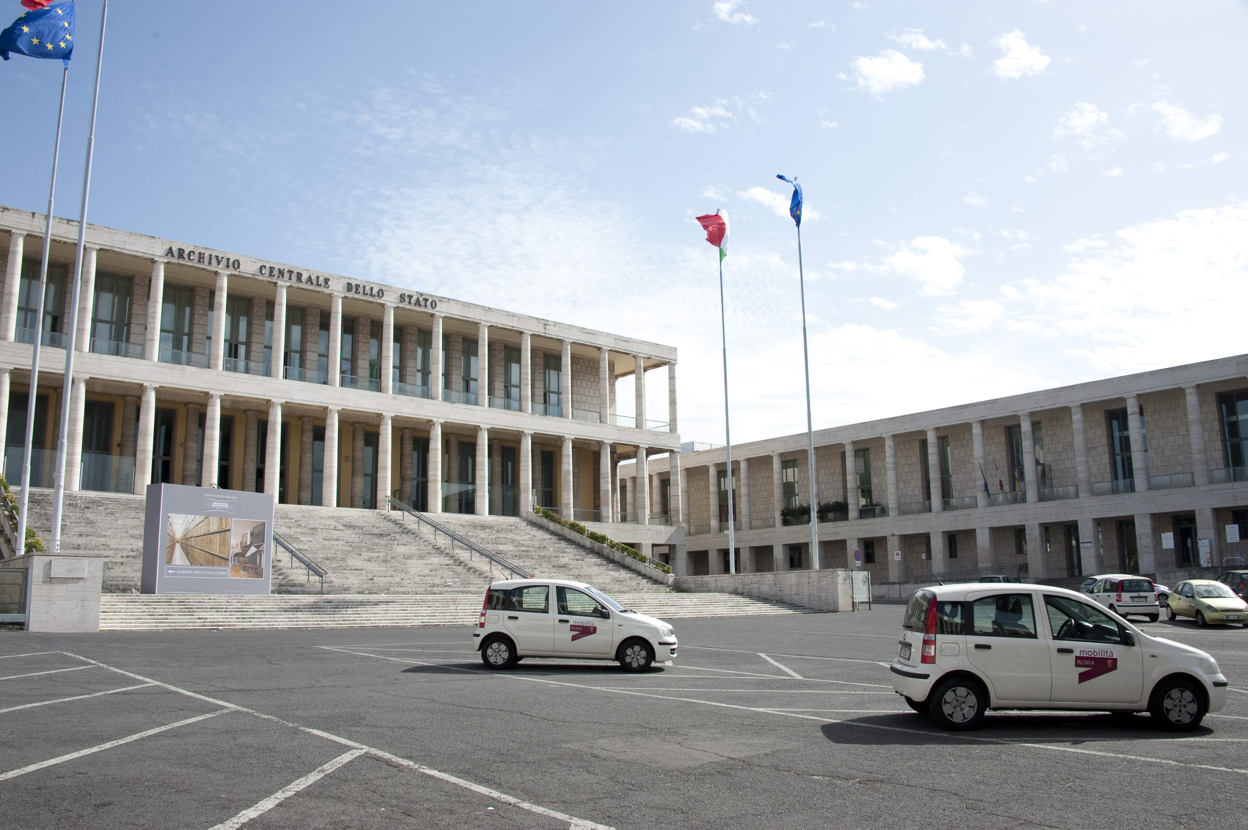 Archivio dello Stato